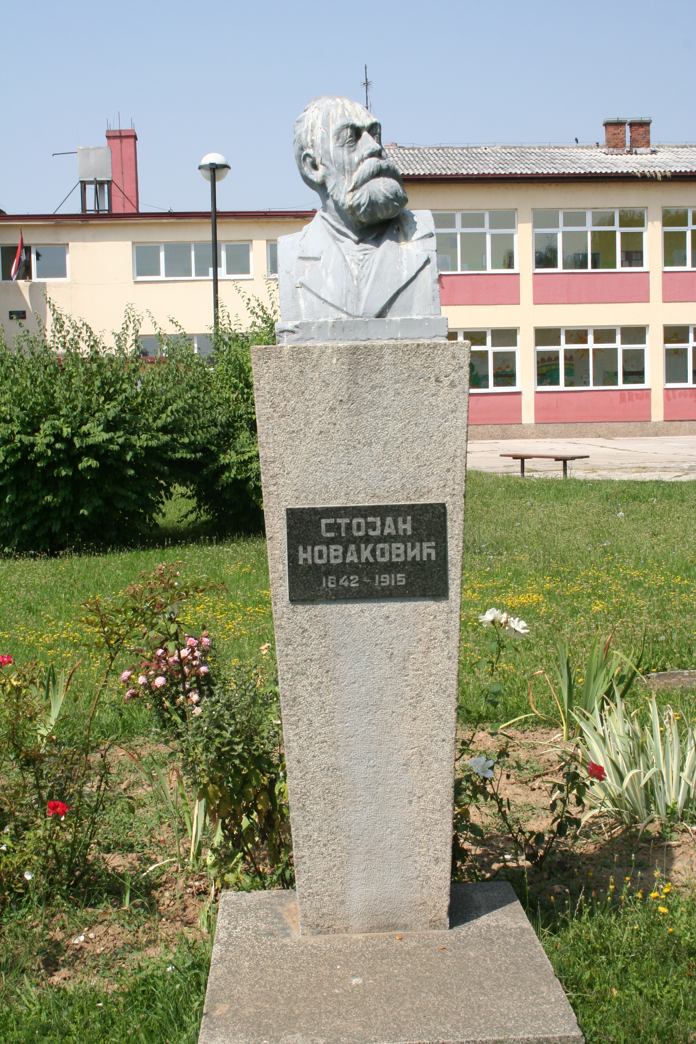 OŠ "Stojan Novaković" Šabac-spomenik u dvorištu škole